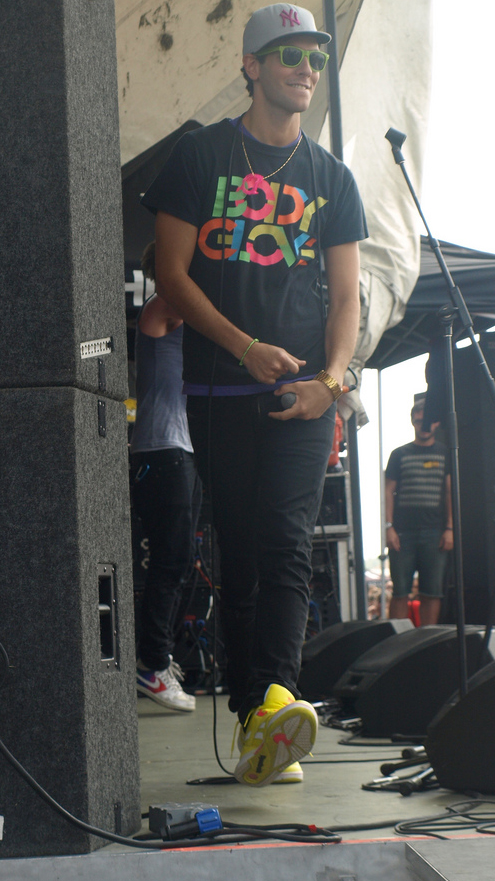 Gabe Saporta